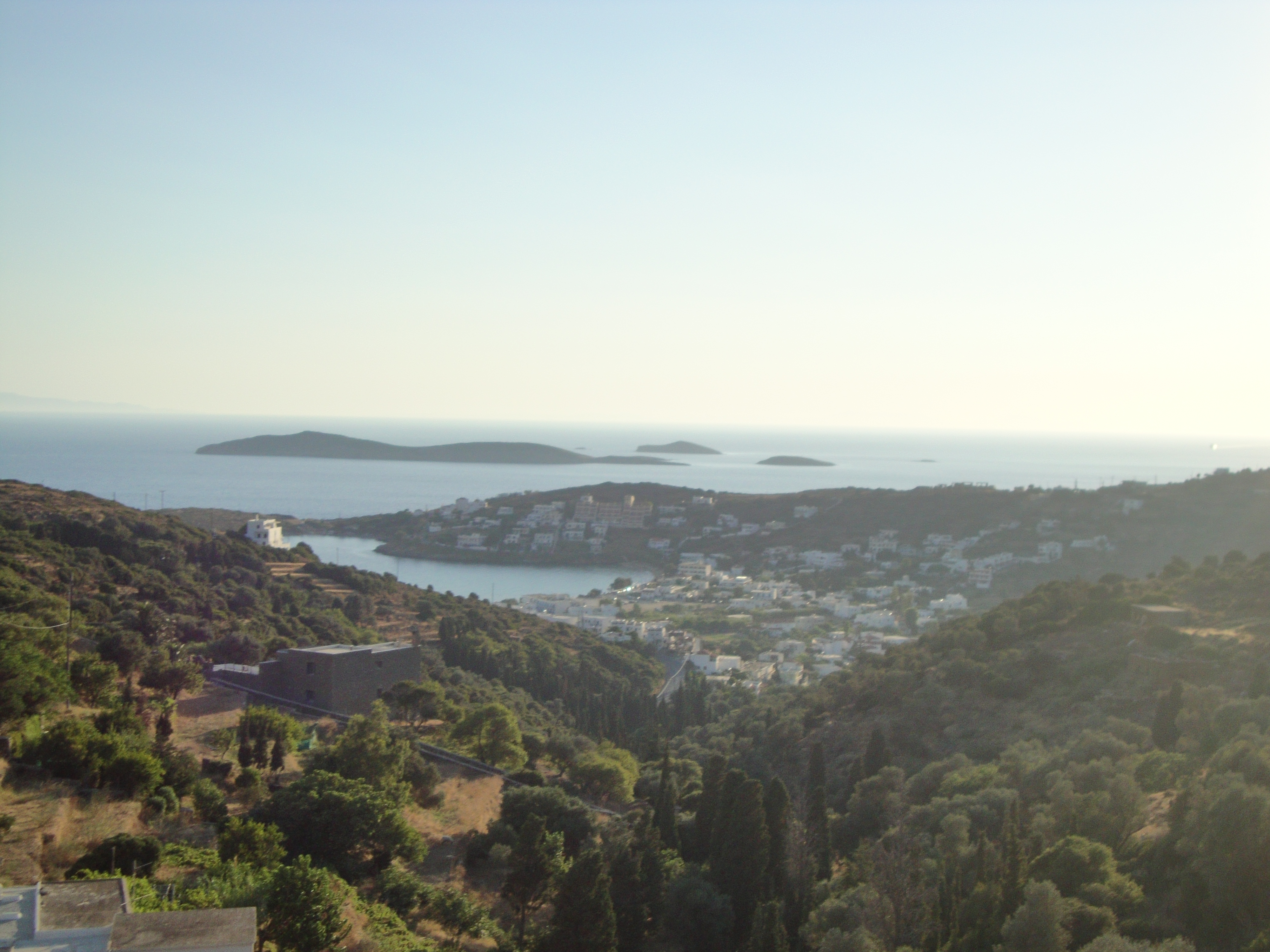 Μπατσί και Γαυριονήσια Άνδρου